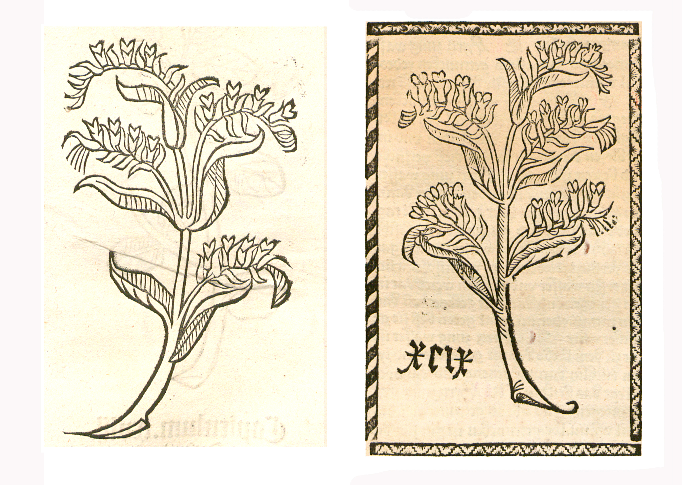 Abbildung von Hunß Zungen (Cynoglossum officinale)